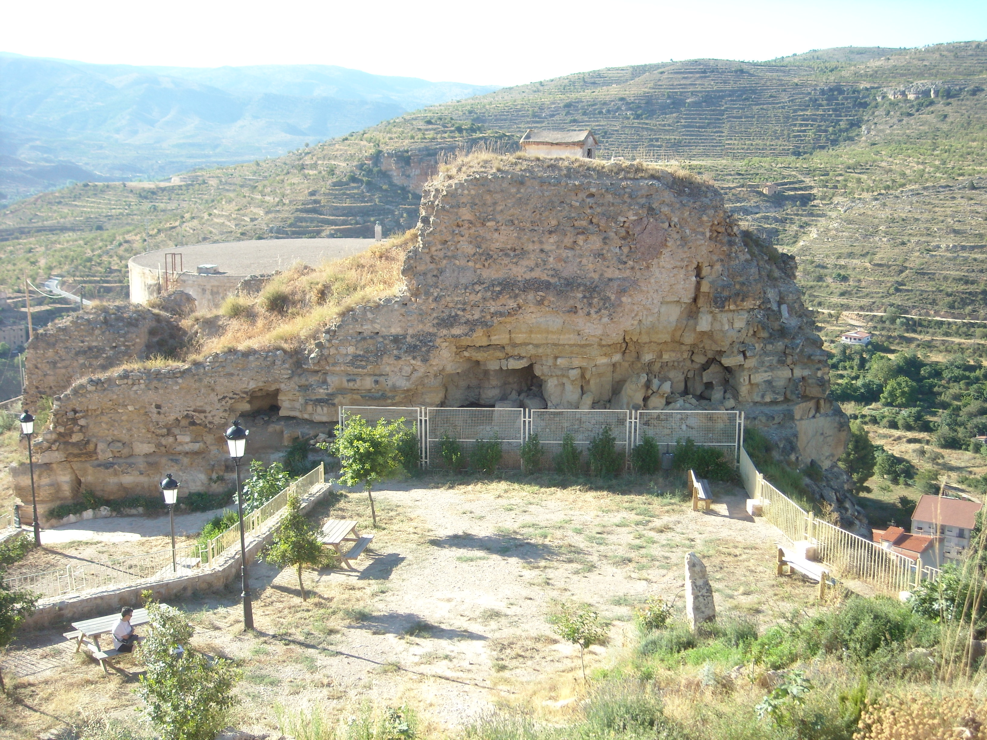 Vista del castell des de la casa del coheter